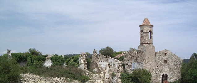 Esglèsia i cases de La Mussara